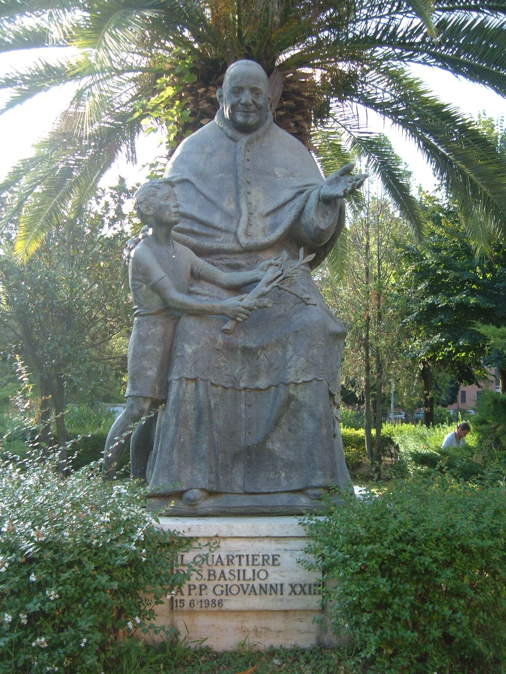 Chiesa di San Basilio, a Roma, nel quartiere San Basilio, in piazzale Recanati.